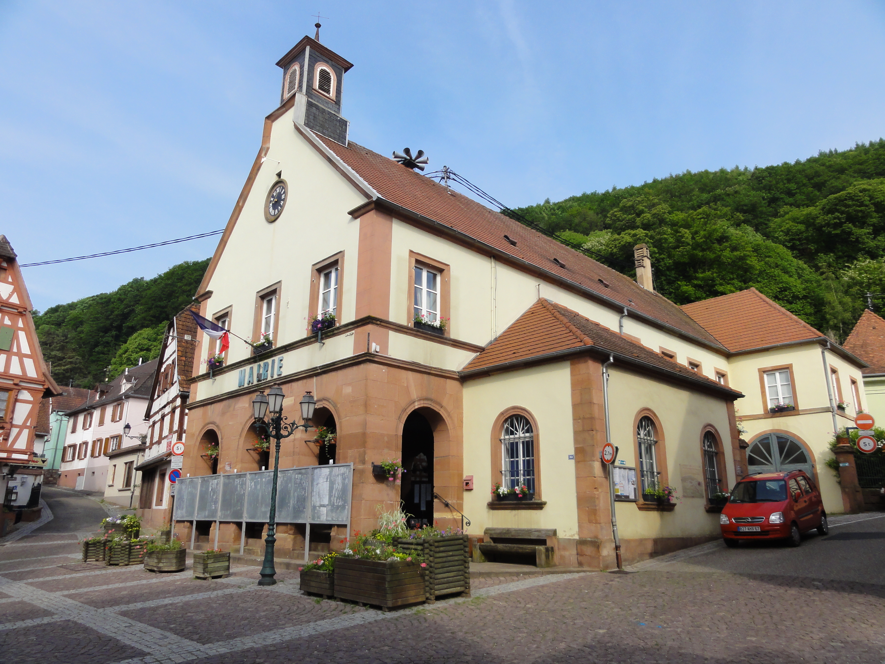 Alsace, Bas-Rhin, Oberbronn, Mairie-école (1846), rue Principale. .